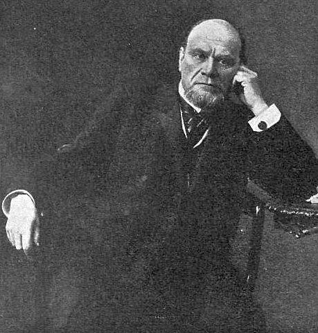 Кони Анатолий Фёдорович